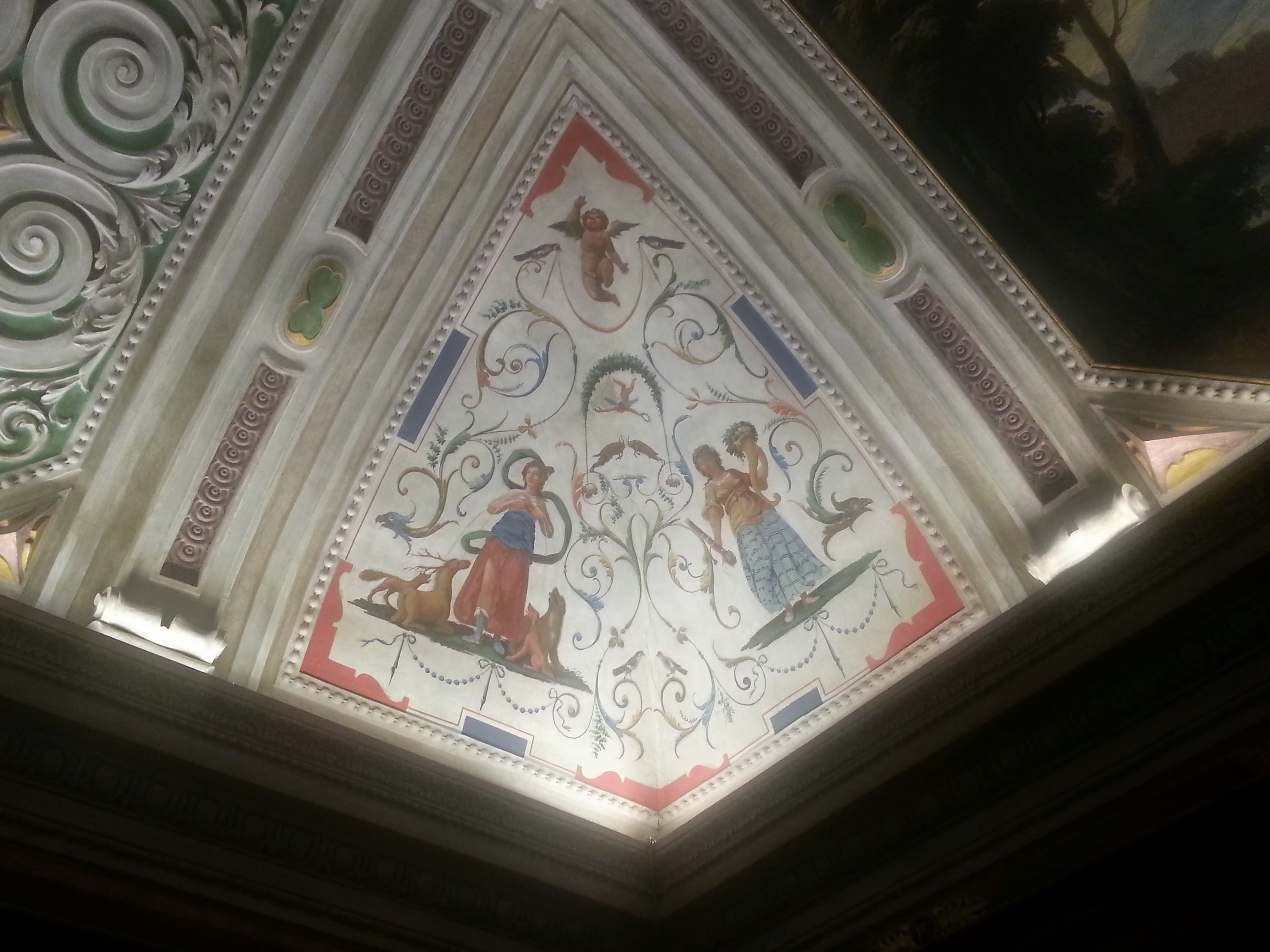 Affreschi di pietro Paschenis per la biblioteca Angelo Mai